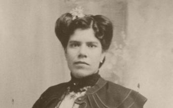 Fundadora del movimiento unipentecostal en México y de la Iglesia Apostólica de la Fe en Cristo Jesús